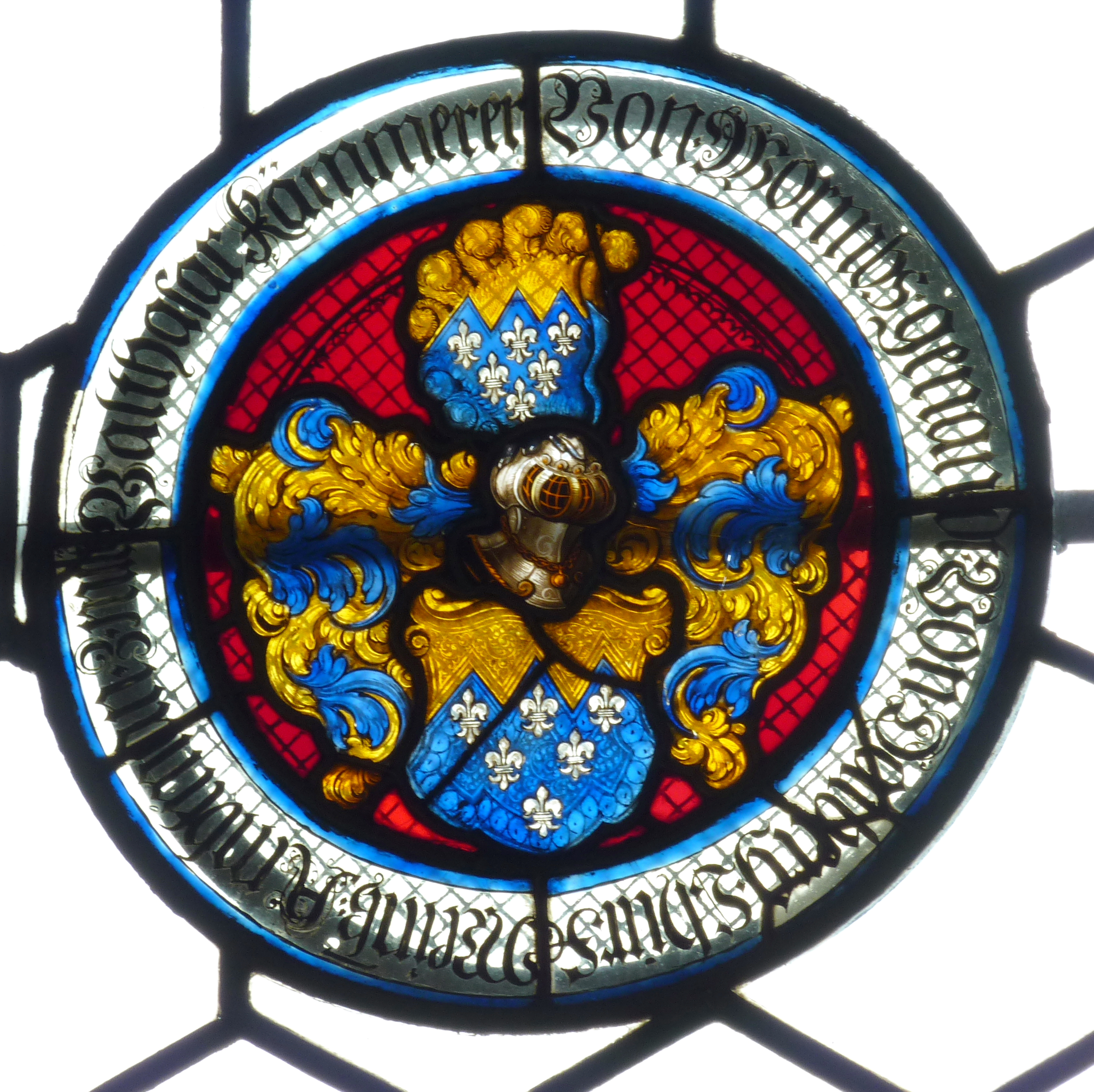 Rathaus in Bürgstadt im Landkreis Miltenberg (Bayern, Deutschland), Wappenscheibe im Sitzungssaal des Balthasar von Dalberg